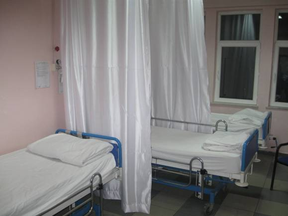 Acil gözetim odası